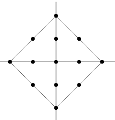 x